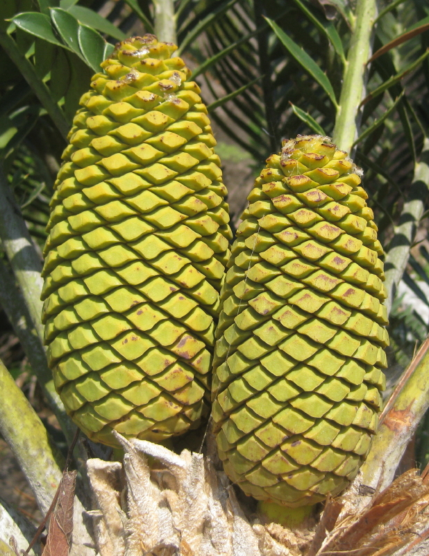 Male cones of Encephalartos turneri close to Ribaue in Nampula province of Mozambique.